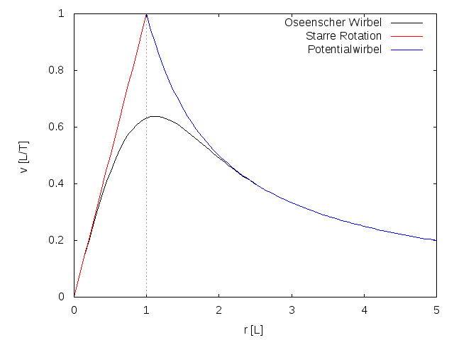 Geschwindigkeitsverlauf im Oseenschen Wirbel